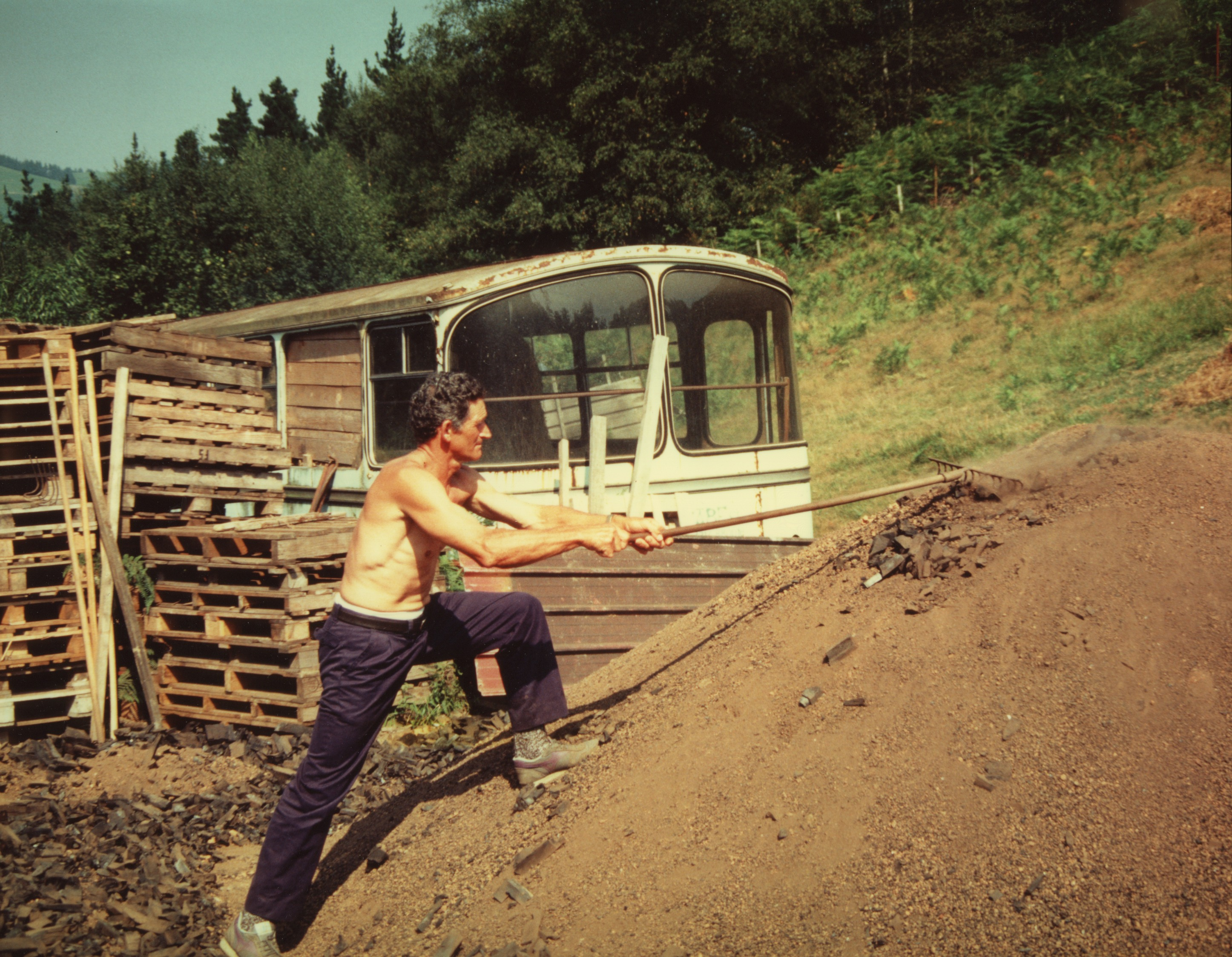 Txondorra Zaldibian 1996an.